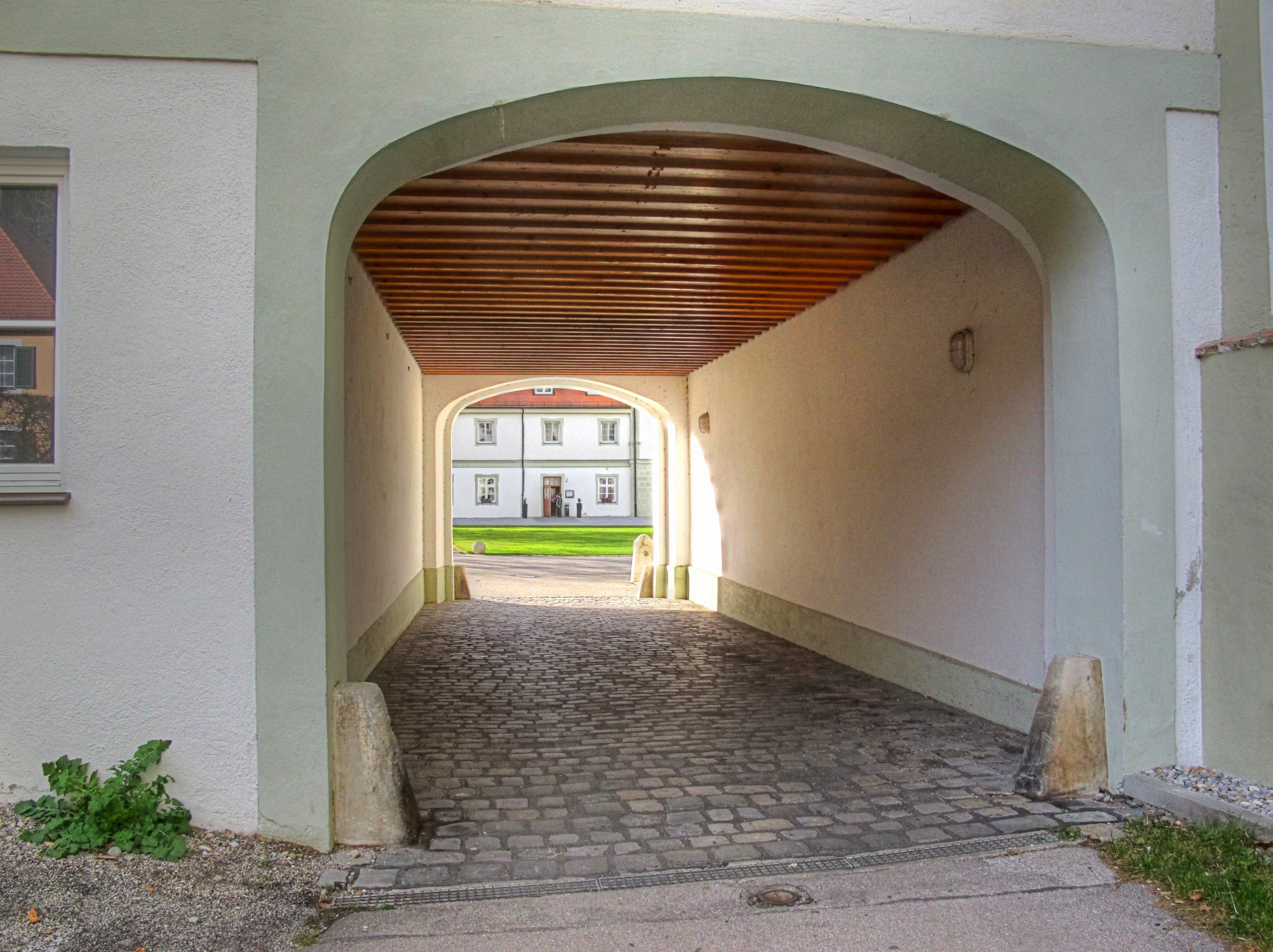 Deutschland, Bayern, Fürstenfeldbruck, Kloster Fürstenfeld, Passage zum Klosterhof